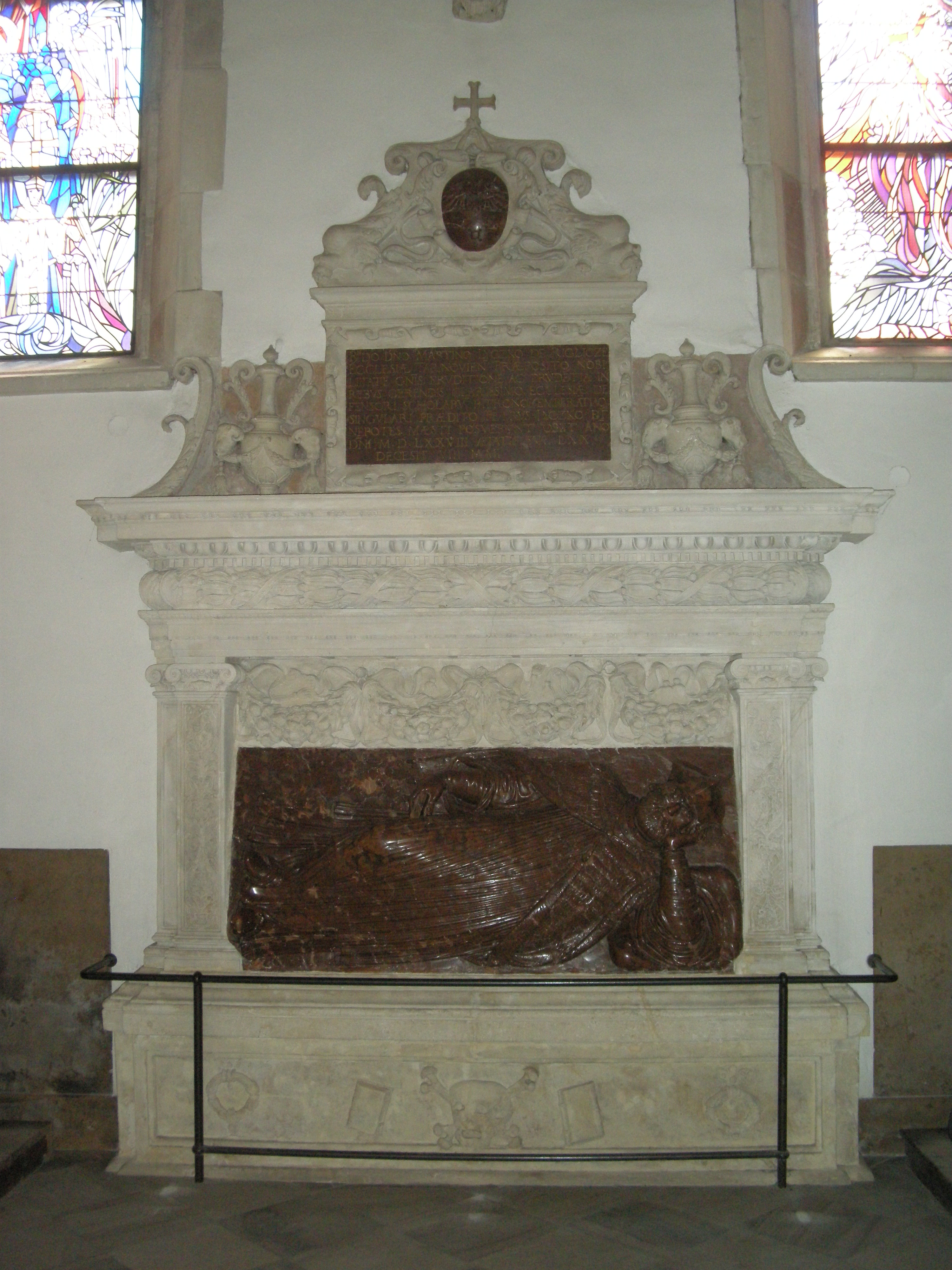 Pomnik prepozyta ks. Marcina Łyczki